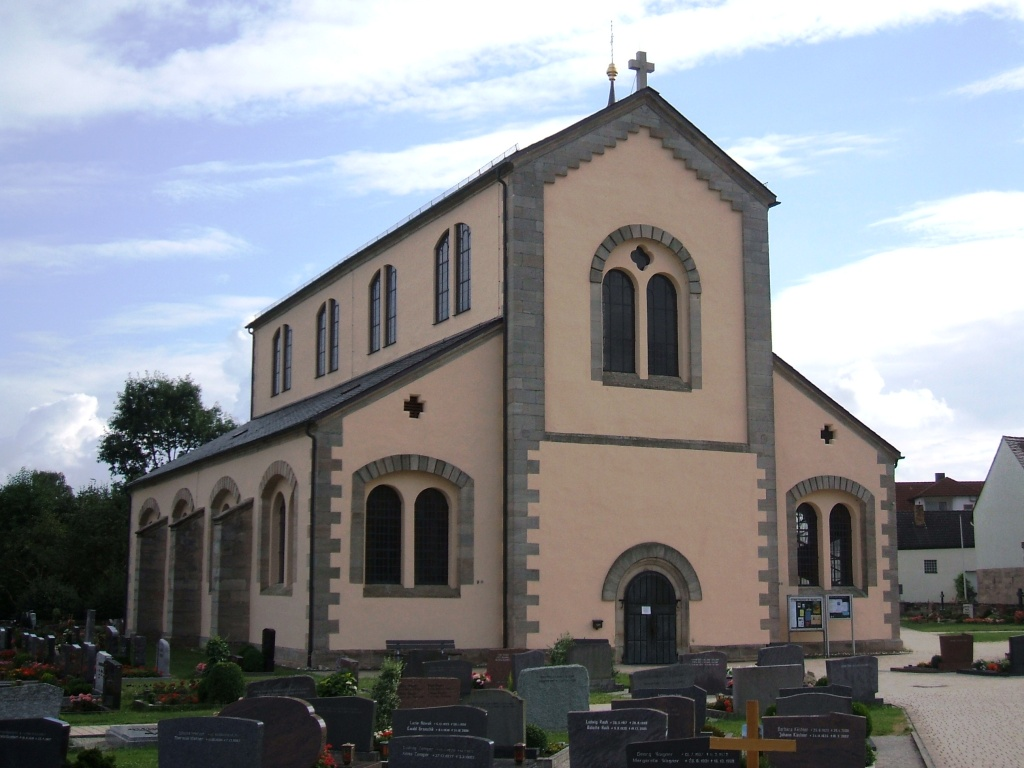 Katholische Pfarrkirche St. Mauritius in Röttenbach, erbaut 1844-50